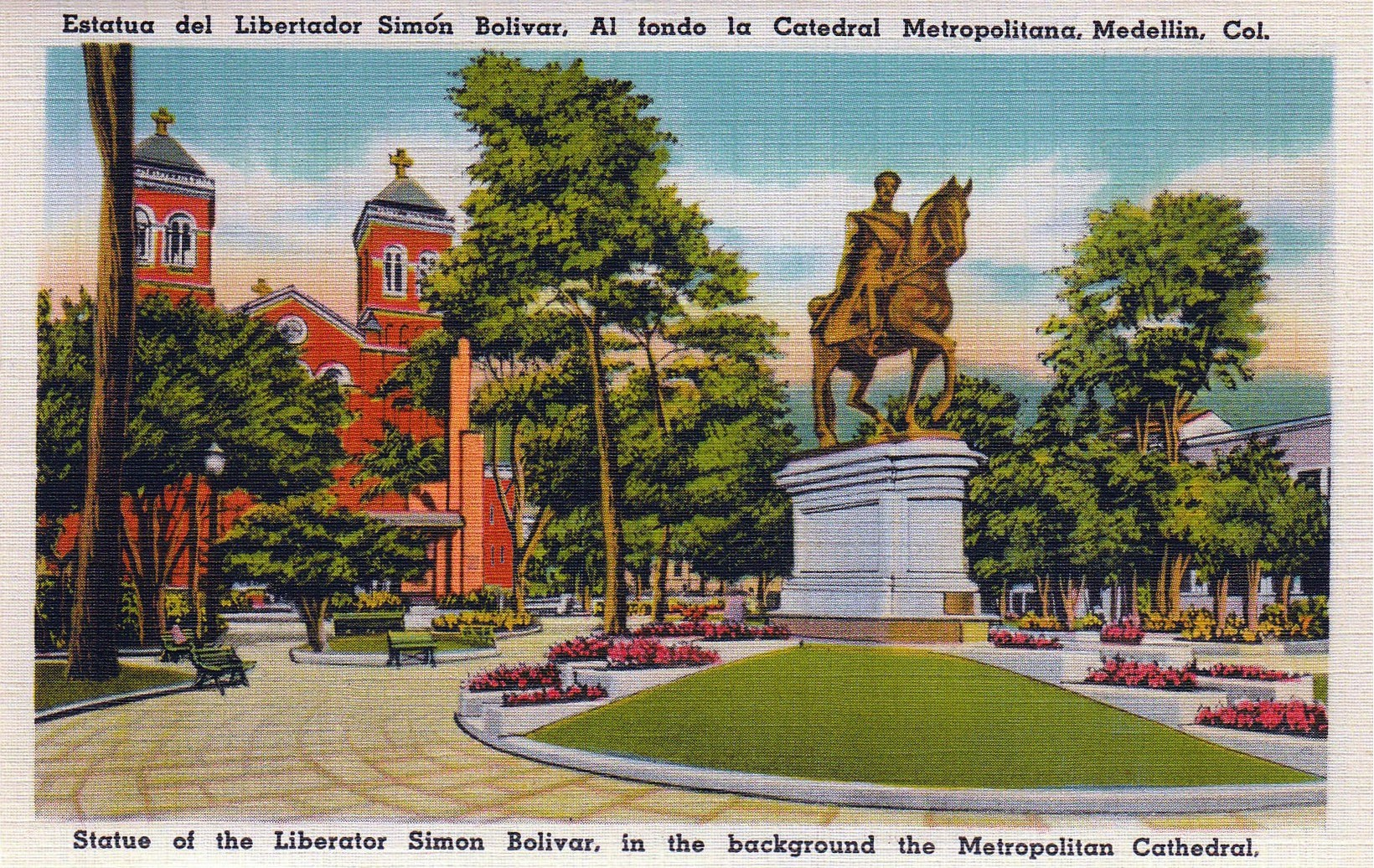 Postal del Parque de Bolívar de Medellín en 1948, nótese la base del pedestal que actualmente a cambiado, y al fondo, el ultimo quiosco (color naranja) de retretas construido en el parque y el cual no existe.